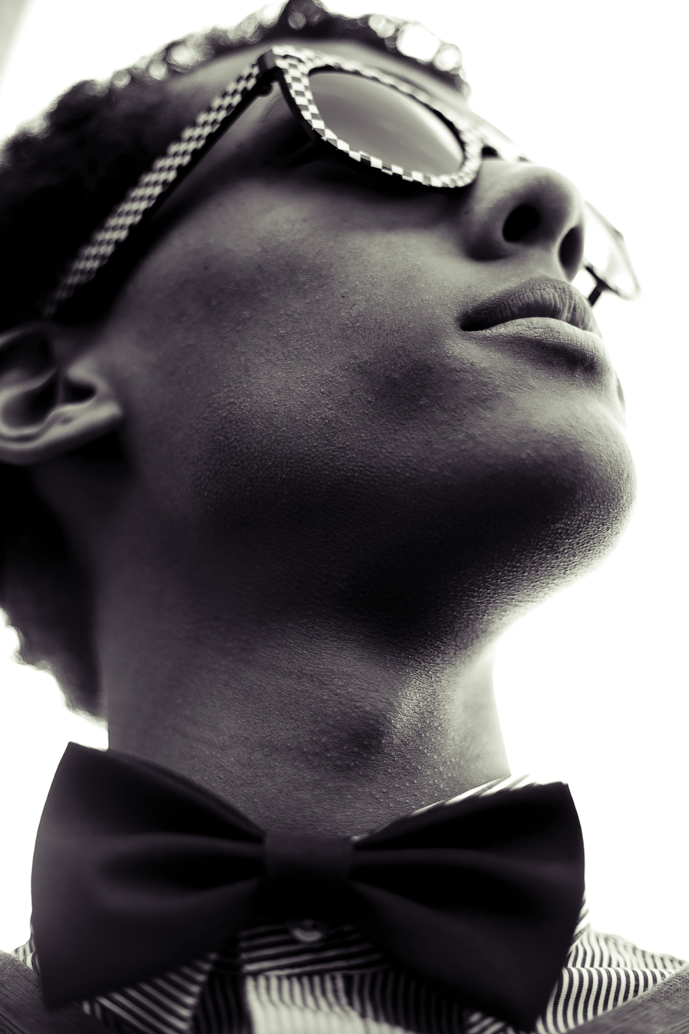 Stromae (Brussel, 12 maart 1985), de artiestennaam van Paul van Haver, is een Belgische singer-songwriter van hiphop en elektronische muziek. Stromae is van Belgisch-Rwandese afkomst.